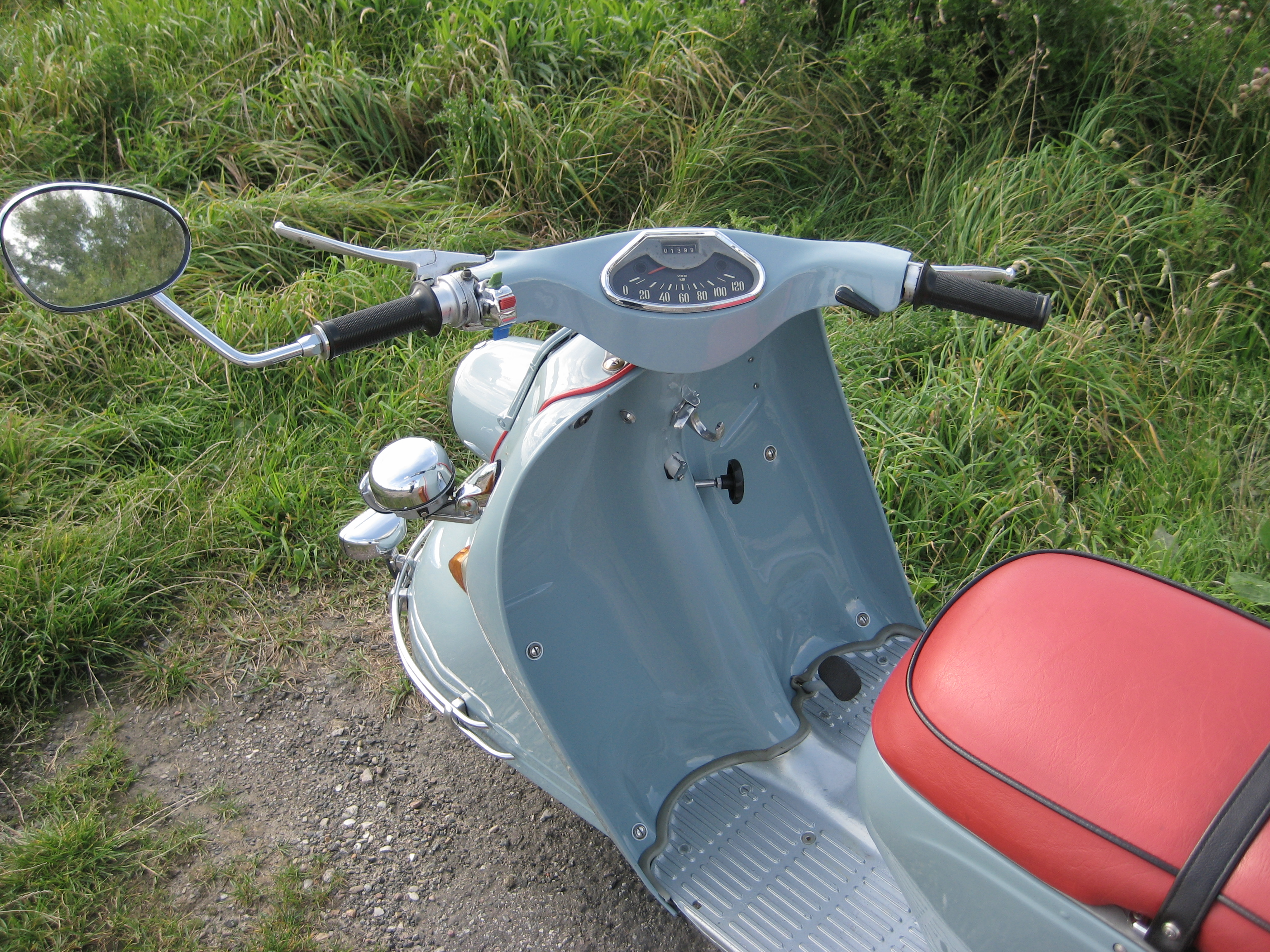 Heinkel Motorroller, aufgenommen am Stoer-Sperrwerk